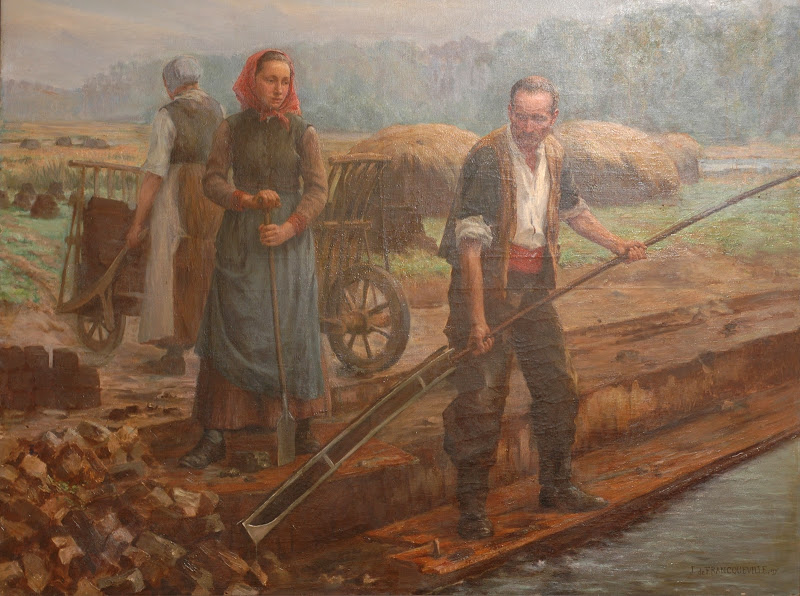 Peinture de Jean de FRANCQUEVILLE